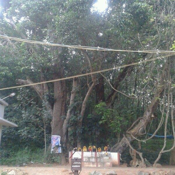 temple